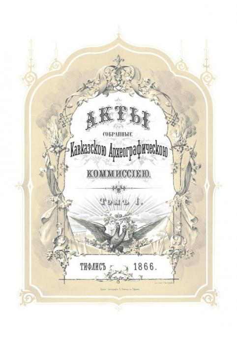 Титульный лист издания